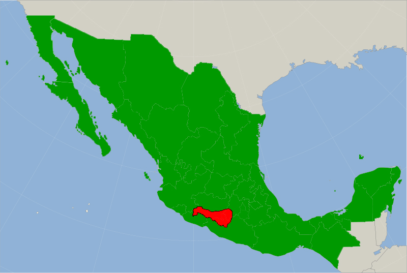 La región de Tierra Caliente en México